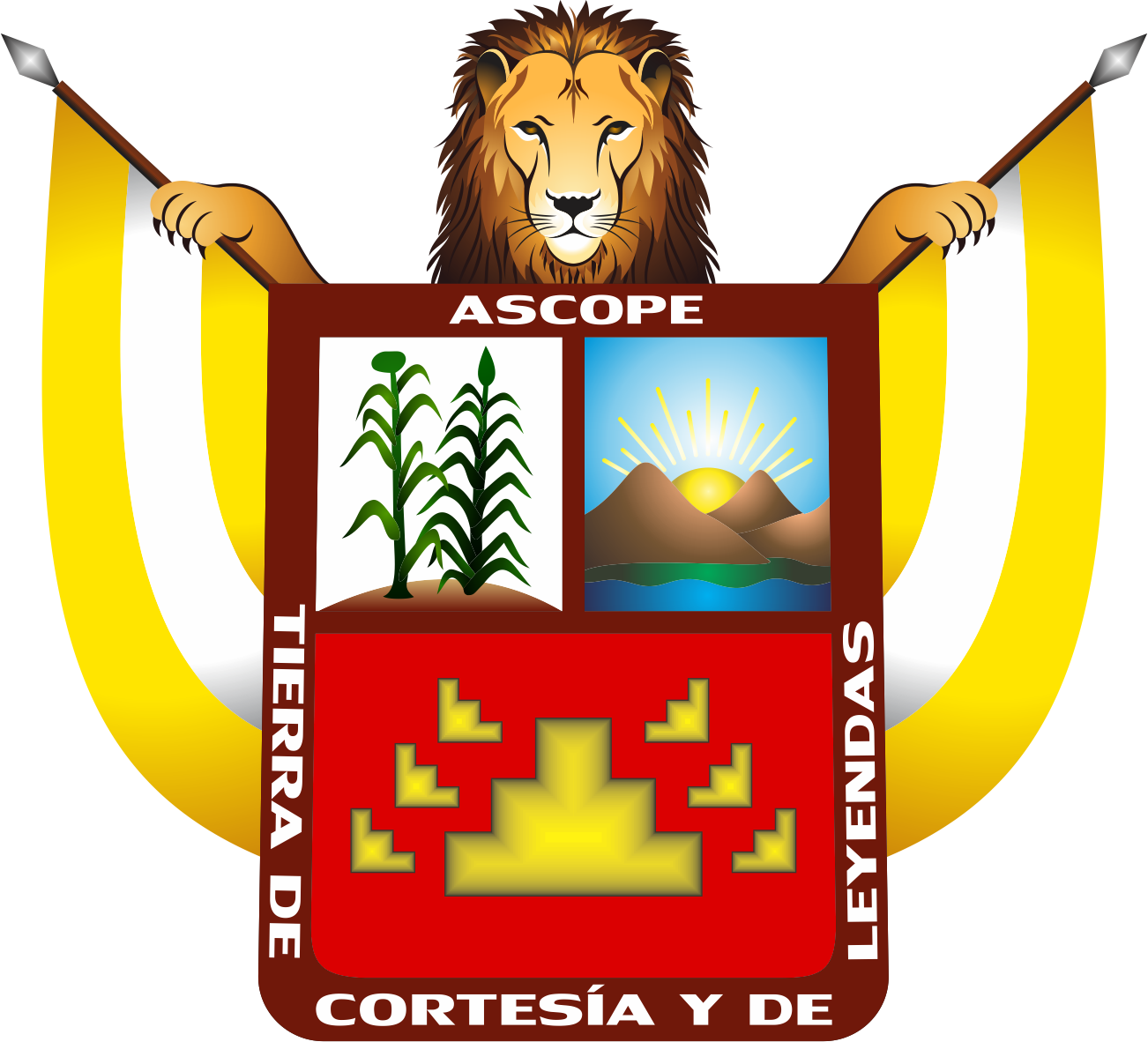 Distrito de Ascope - Provincia de Ascope - región La Libertad